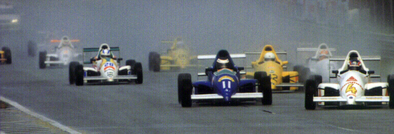 Formula Asia 2000 race start.